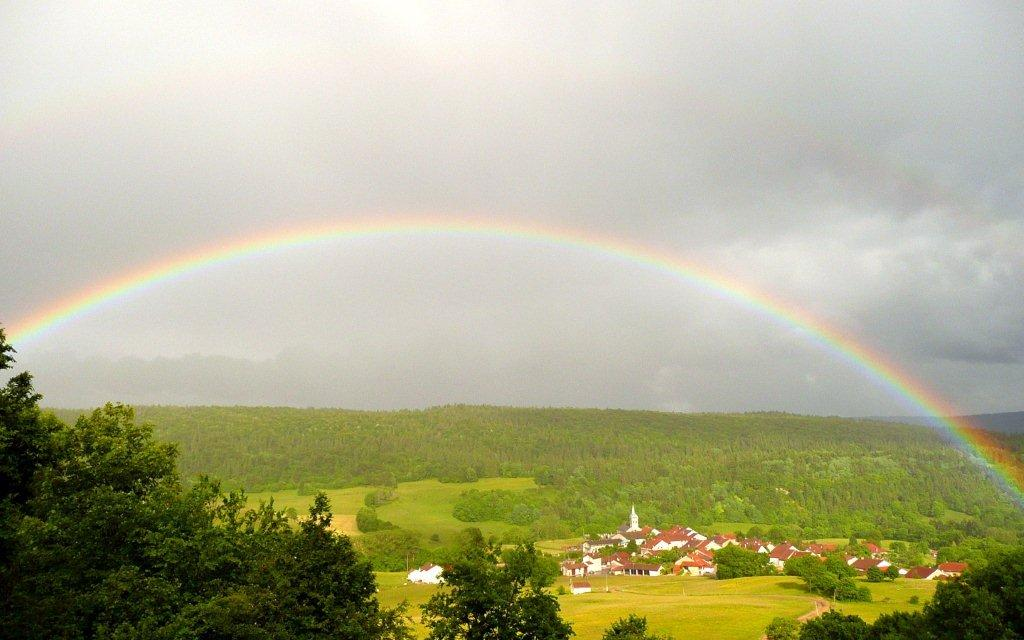 Vue du village de Charix, dans le département de l'Ain, sous un arc-en-ciel.